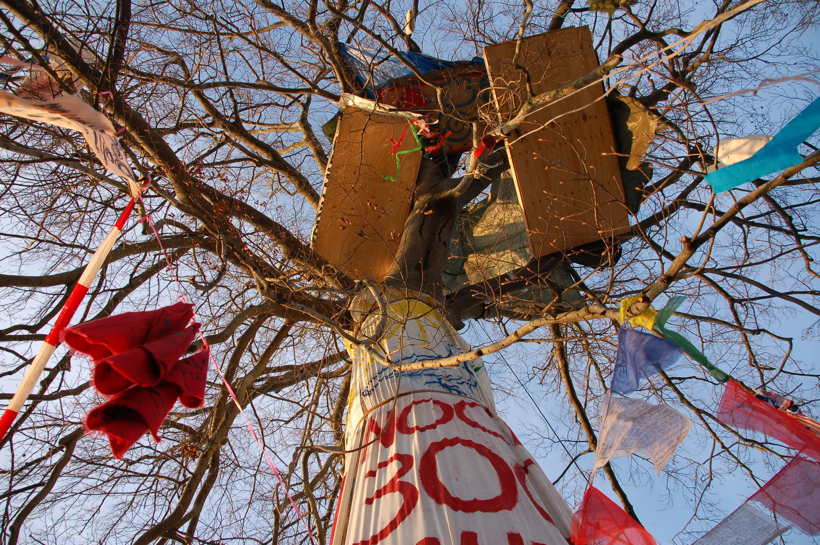 Die besetzte Buche in Dresden 2007/2008